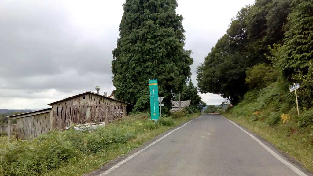 Vista de Ladrús, Curtis.